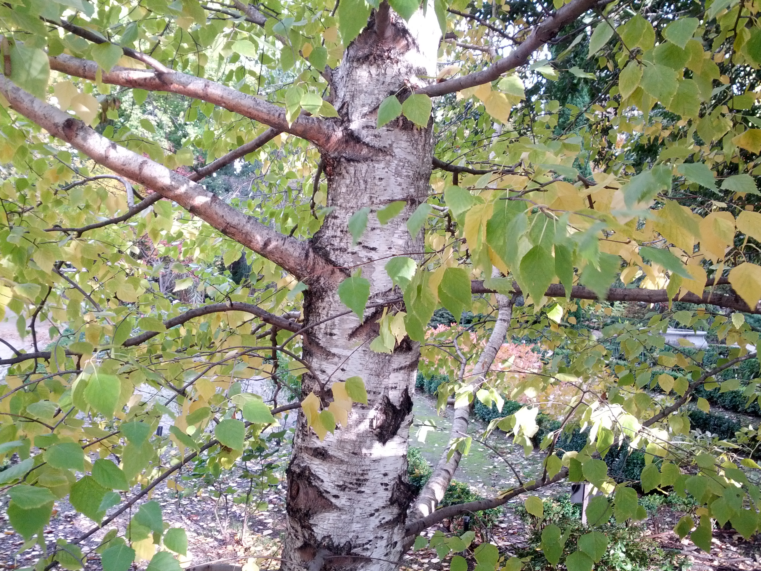 Abedul en el Jardín Botánico de Madrid, España